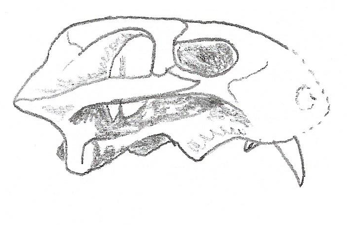 Skull of Dicynodon